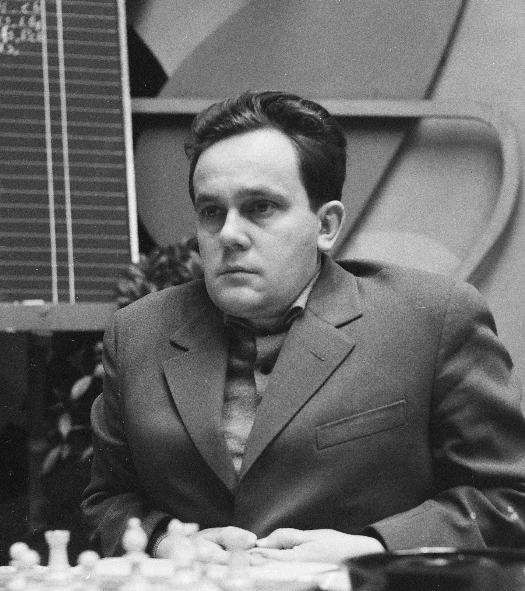 28e Hoogoven schaaktoernooi te Beverwijk, Bilek (Hongarije)